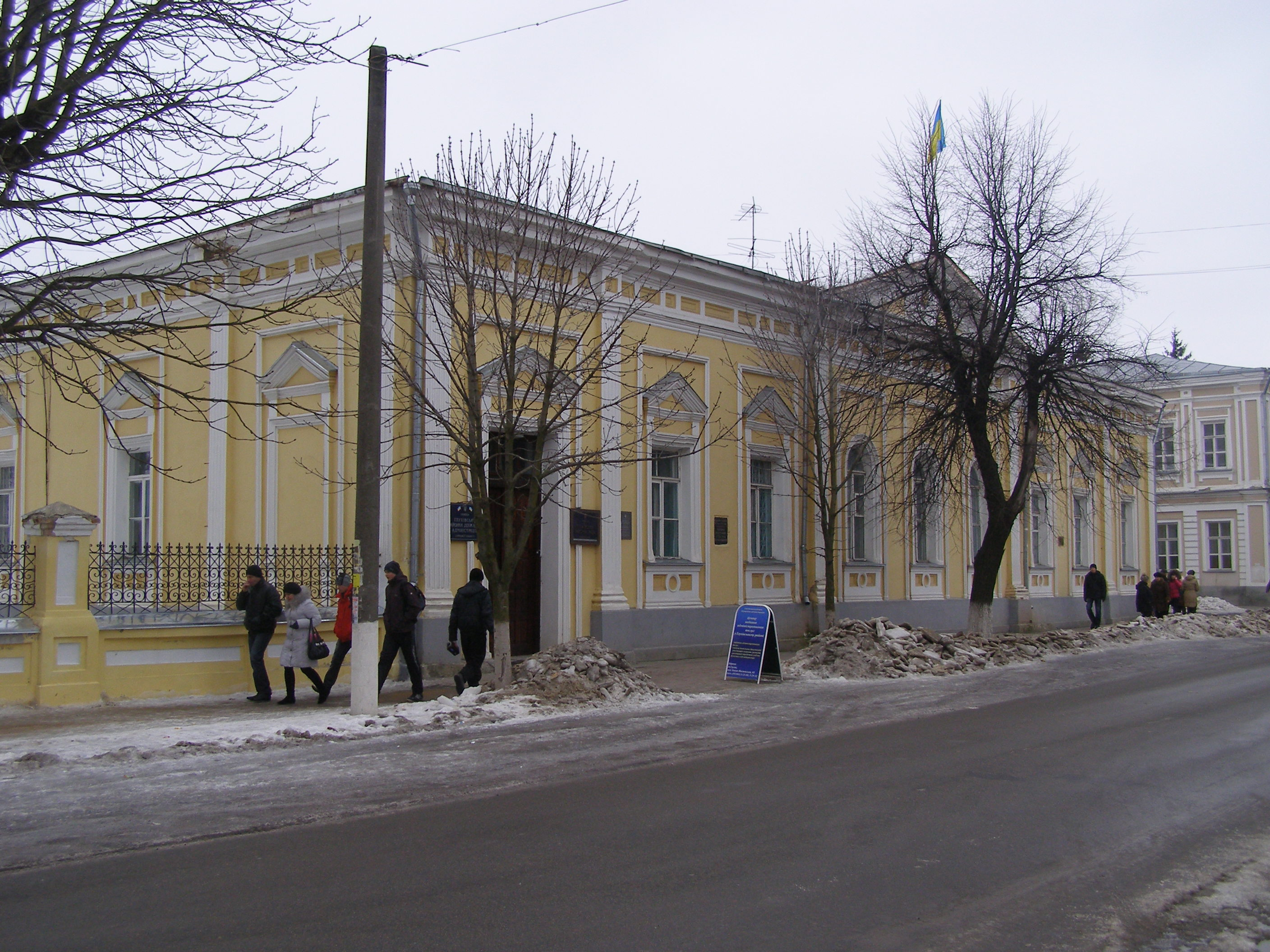 Садиба Неплюєвих, Глухів, вул. Києво-Московська, 43